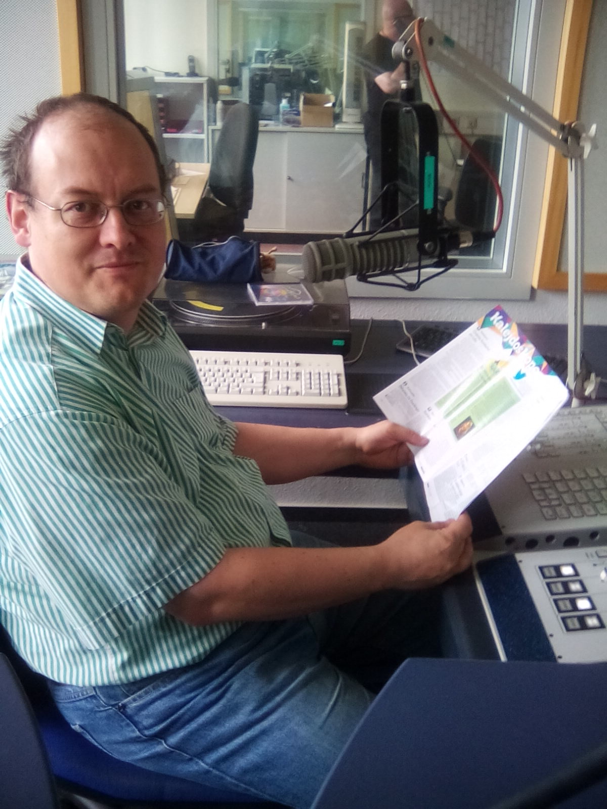 René Philipp dum antaŭproduktado de radioelsendo pri Esperanto, en julio 2015